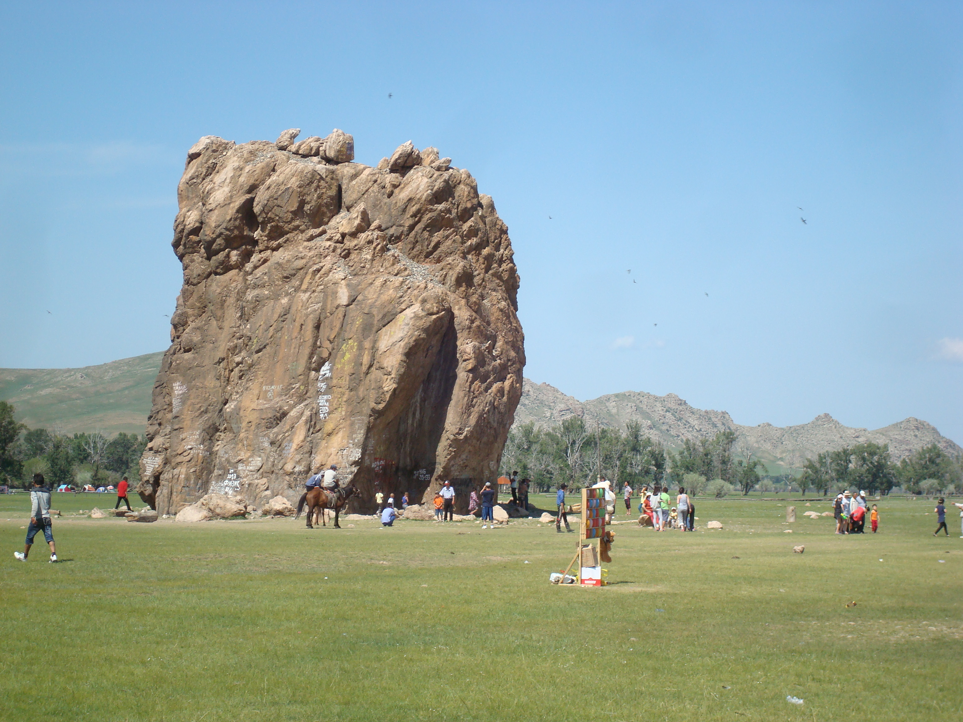 Am Taikhar Chuluu